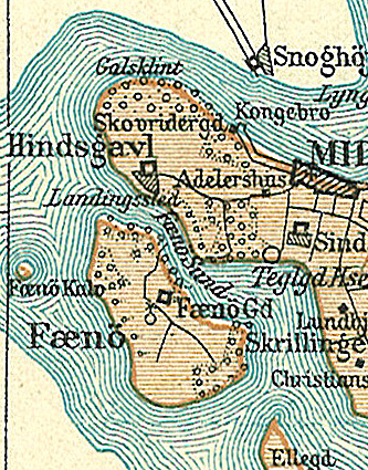 Map of Fænø in Lillebælt